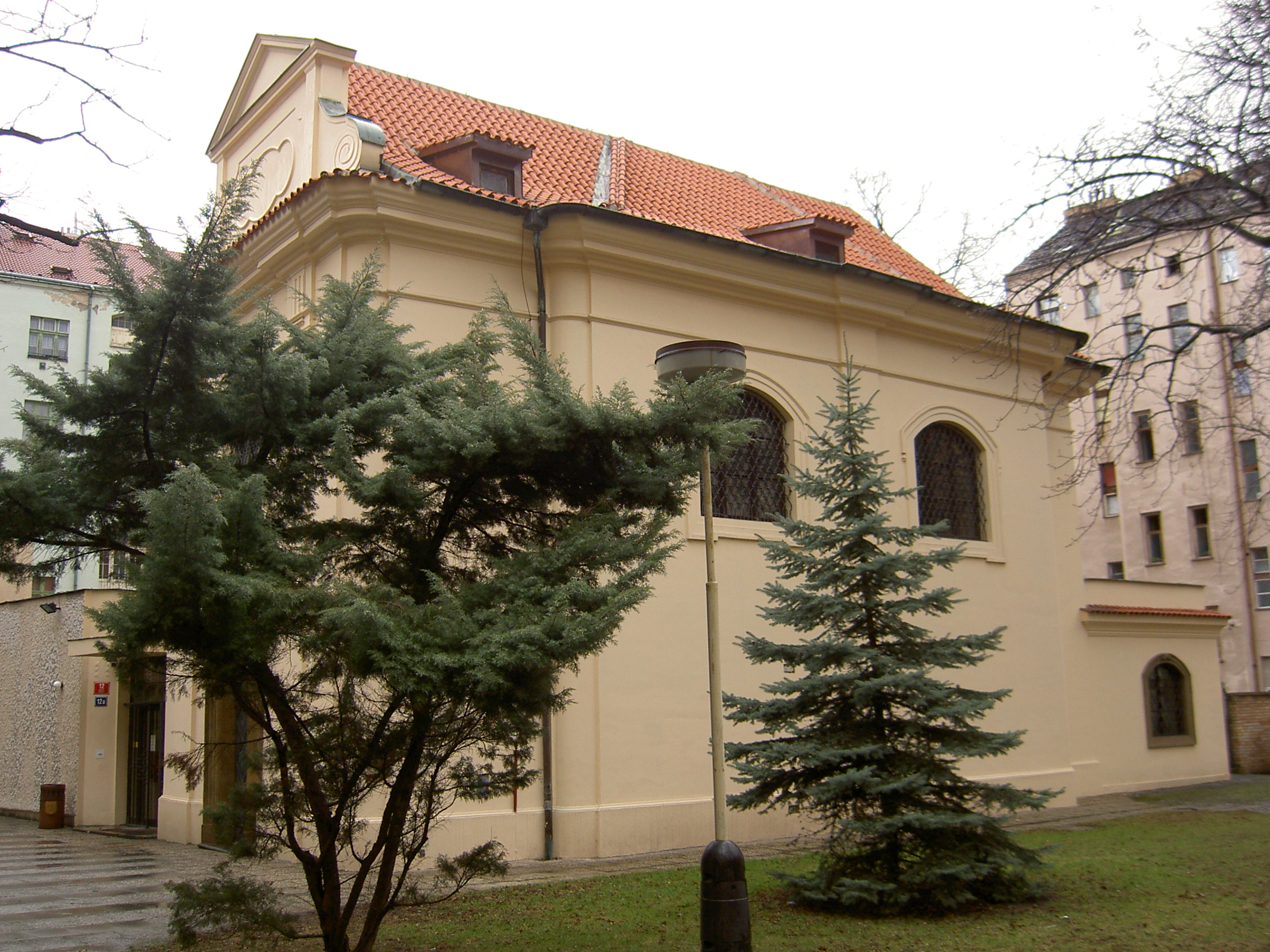 Kostel svatého Kříže na Žižkově